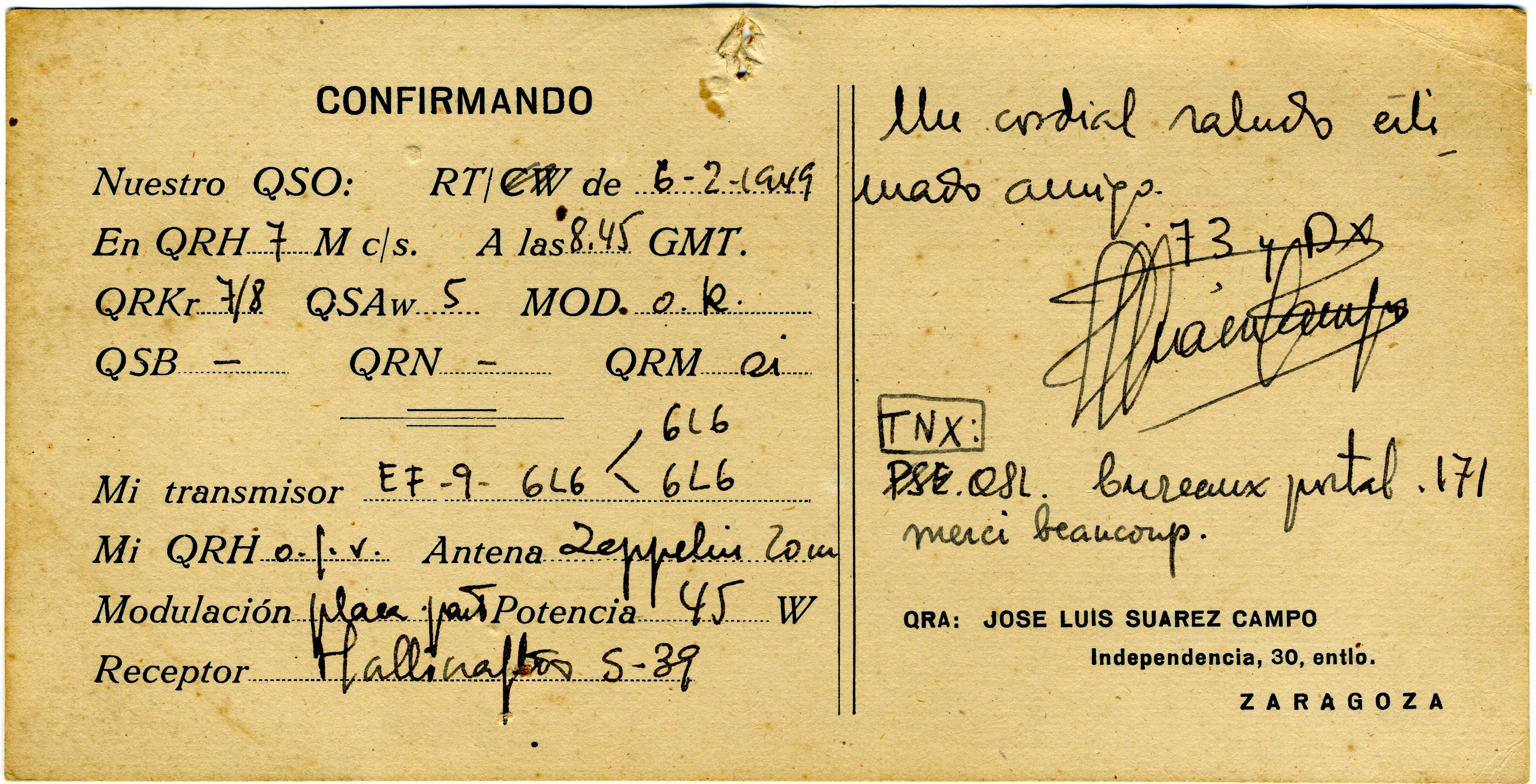 Verso de la carte QSL de EA-2-AG (Espagne) envoyée à F9LB (France), février 1949.